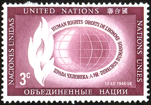 Беларуская (тарашкевіца): Паштовая марка ААН «Правы чалавека»